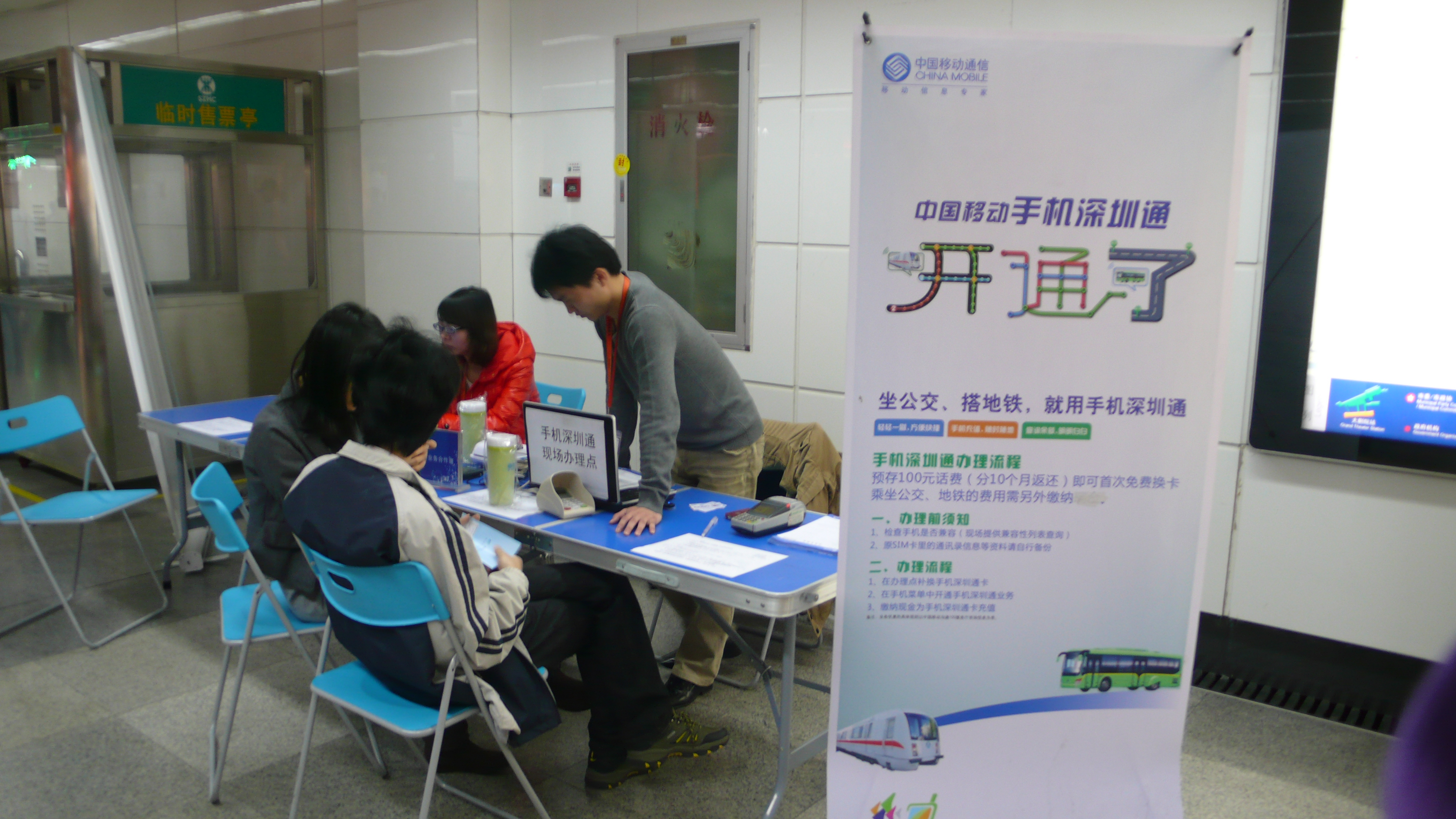 深圳通公司在大剧院地铁站推广手机深圳通